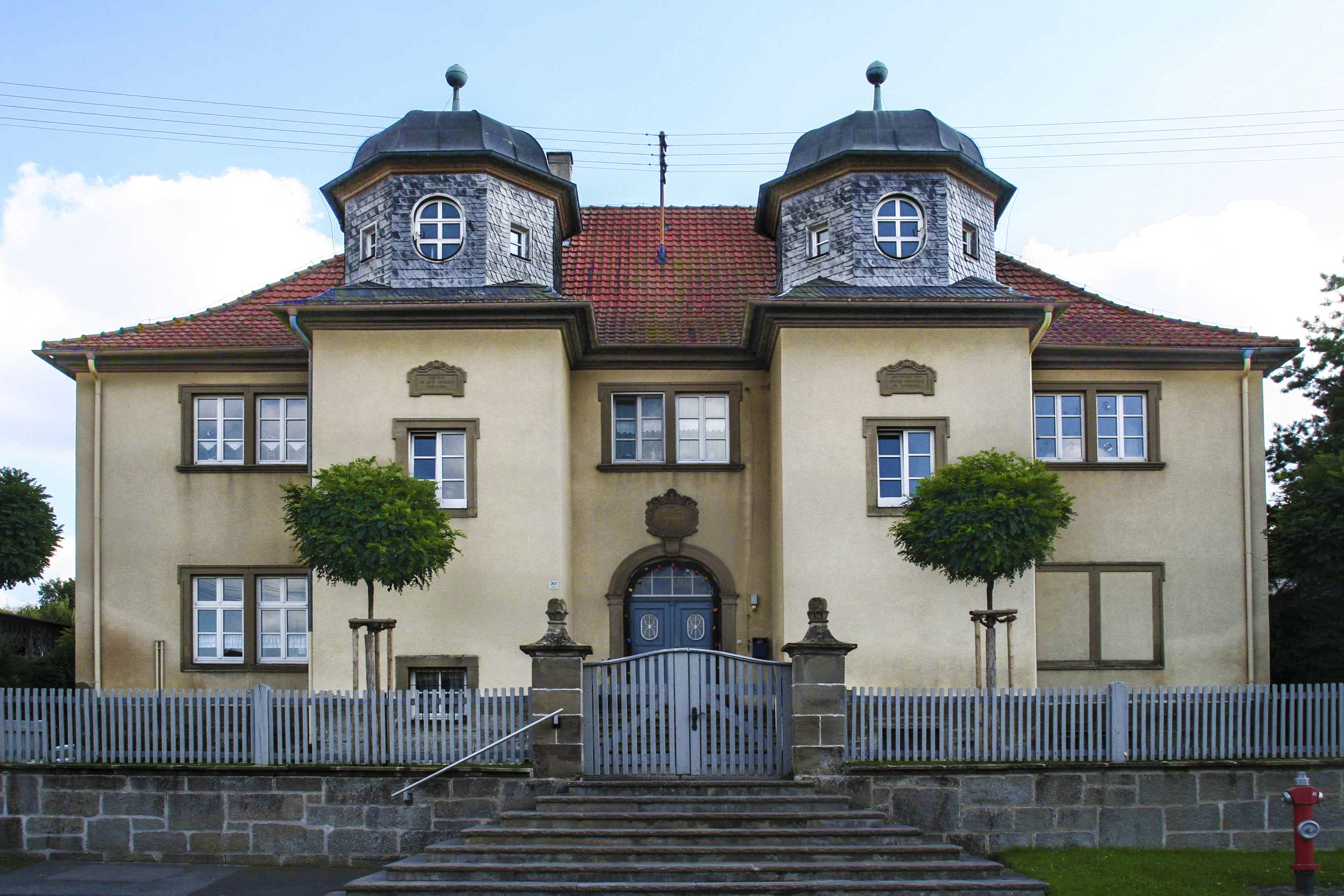 Nirvard-Kirchner-Haus in Trappstadt im Landkreis Rhön-Grabfeld in Bayern